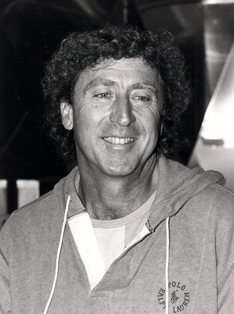 Gene Wilder 02